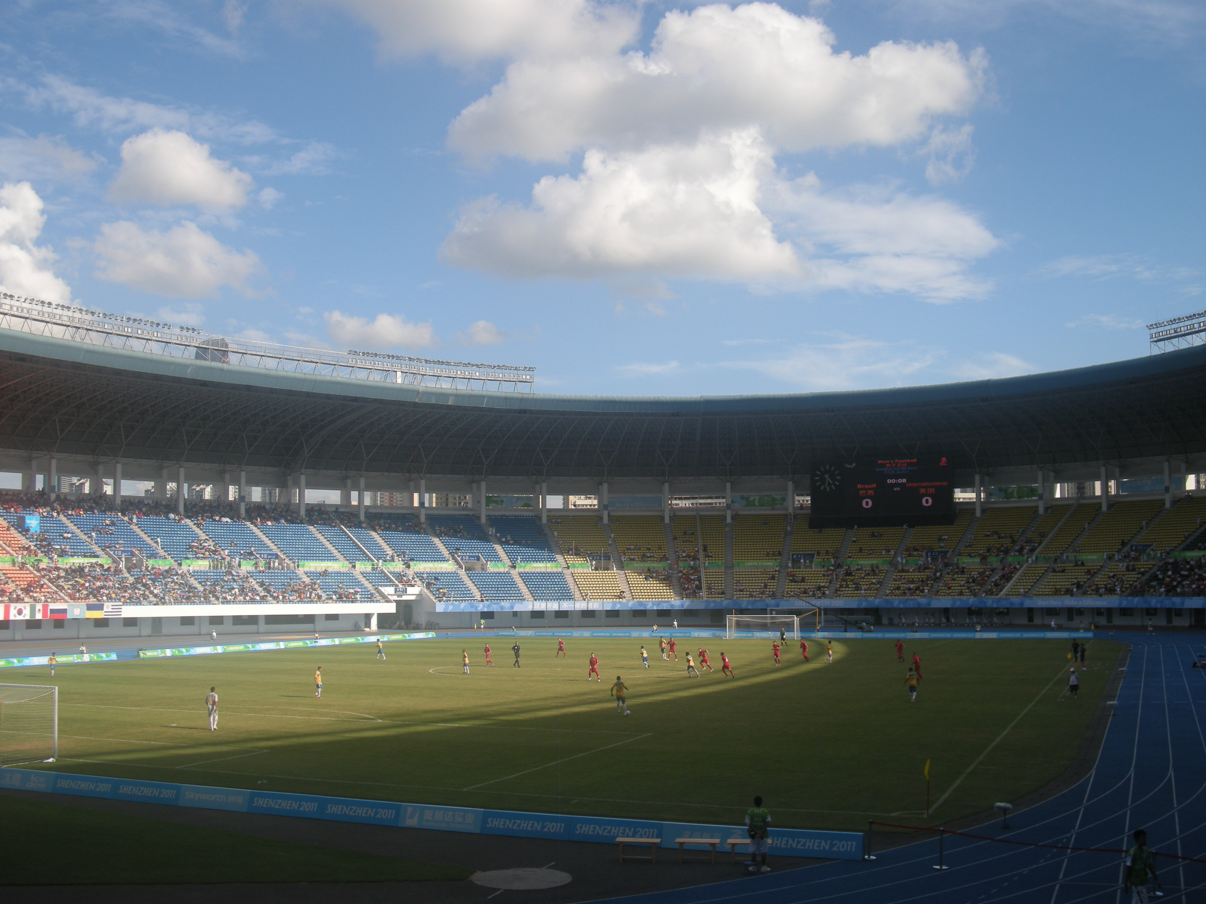 大运足球半决赛现场（巴西VS英国）